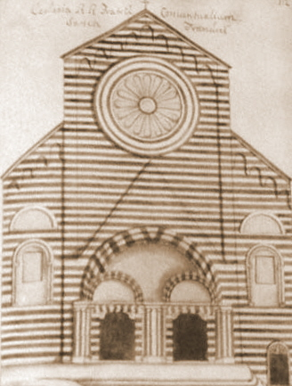 Riproduzione della facciata della chiesa (demolita) di San Francesco di Castelletto a Genova, eseguita da Domenico Piaggio nel XVIII secolo, appartenente alla sua raccolta Monumenta Genuensia conservata presso la Civica Biblioteca Berio di Genova.